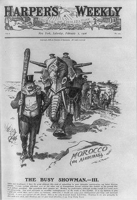 Fonte: Biblioteca del Congresso degli Stati Uniti. Descrizione: Vignetta del 1906 sulla Conferenza di Algeciras: il presidente USA Roosevelt "sbarca" in Marocco adottando la strategia del "Grande bastone".